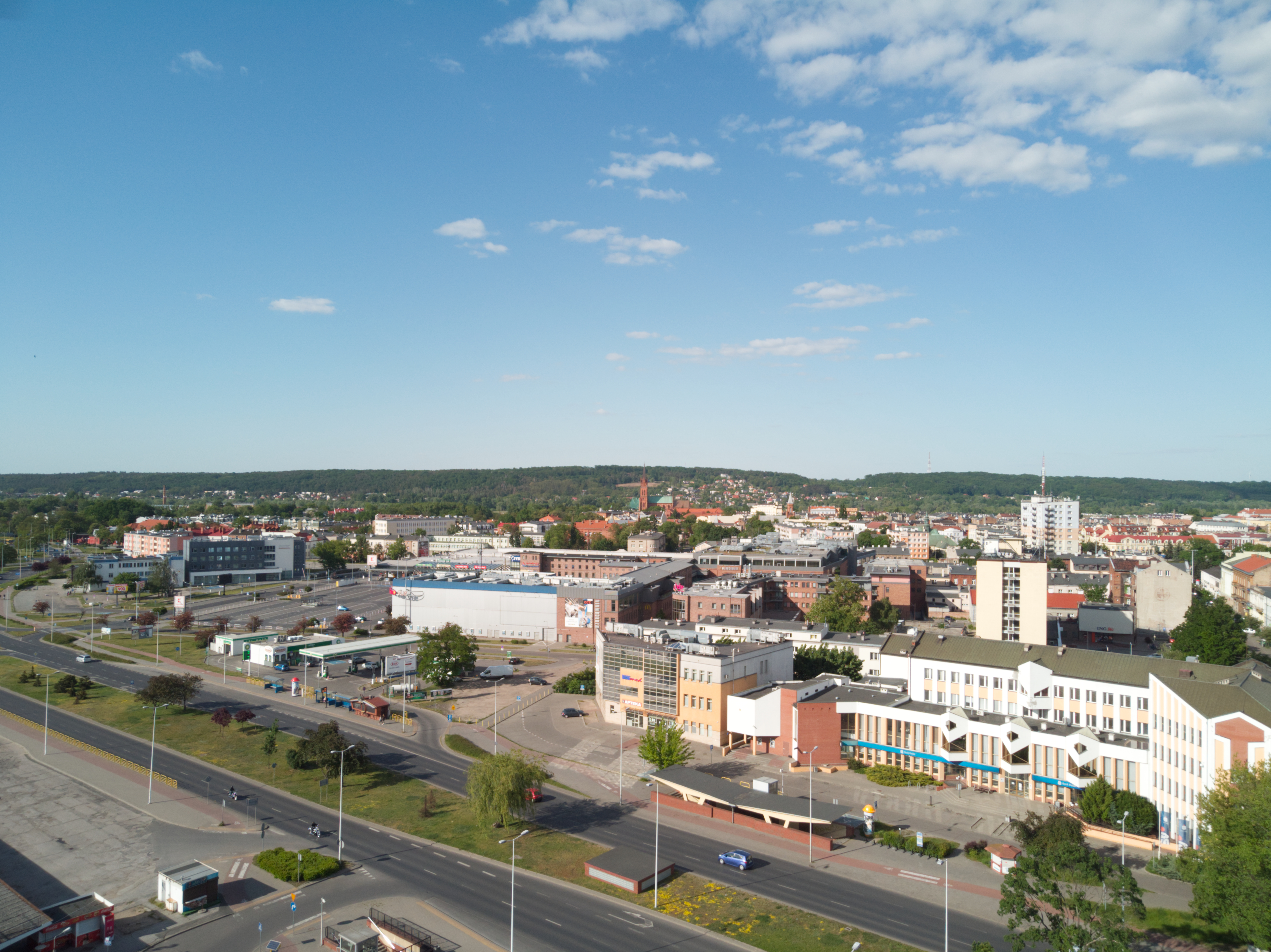 Śródmieście (2020 r.)